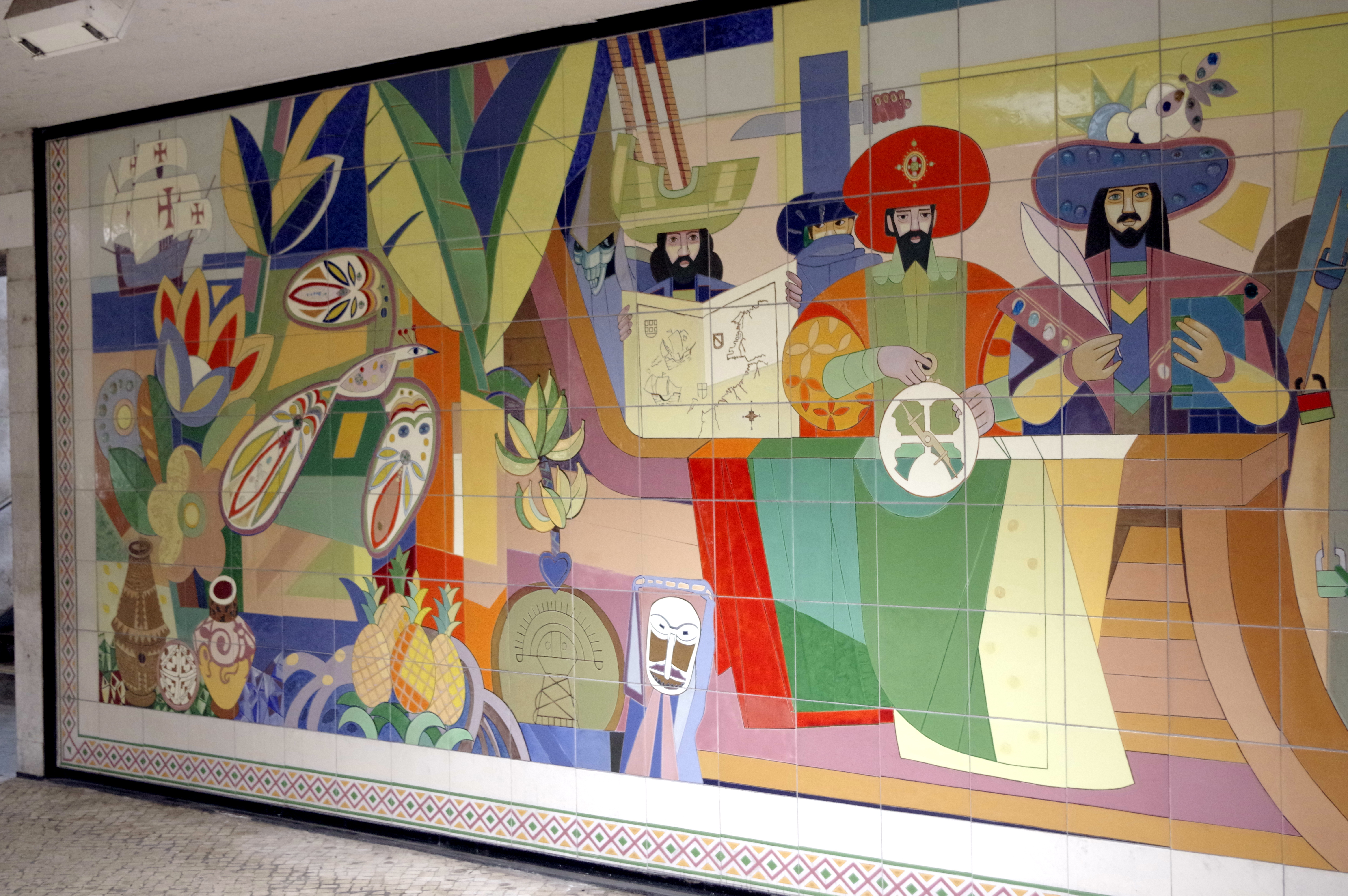 16.4.14 Lisbon 01